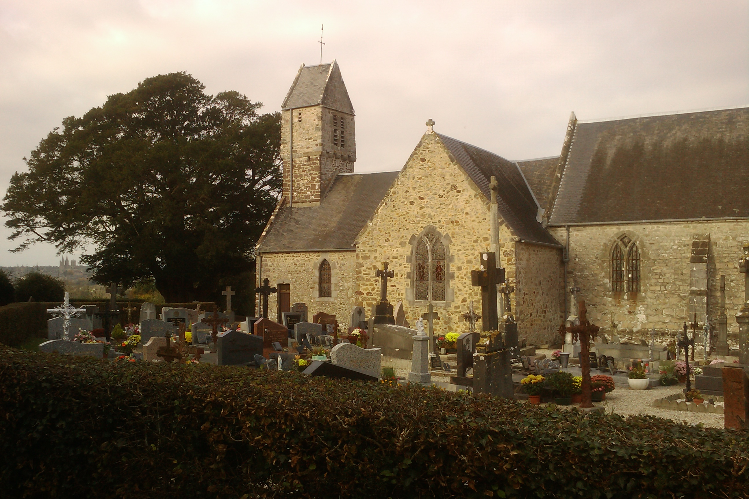 Cimétière et Église Saint-Corneille de Nicorps